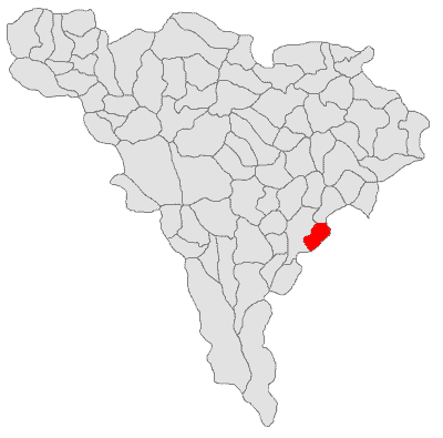 Categorie:Hărţi ale judeţului Alba